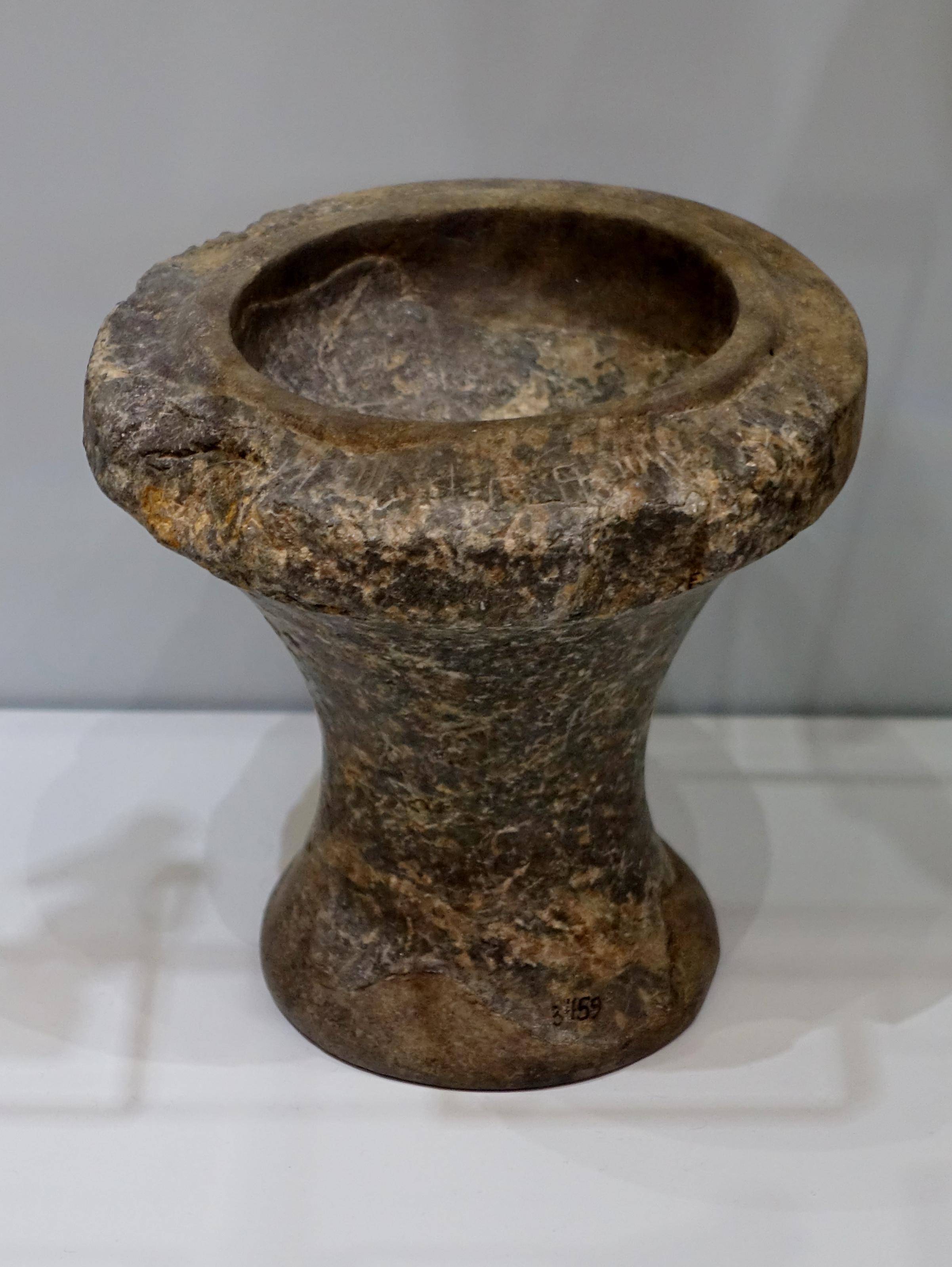 Steingefäß (1600–1000 v. Chr.), gefunden im Heiligtum des Hermes und der Aphrodite bei Symi, Archäologisches Museum von Iraklio, Kreta, Griechenland